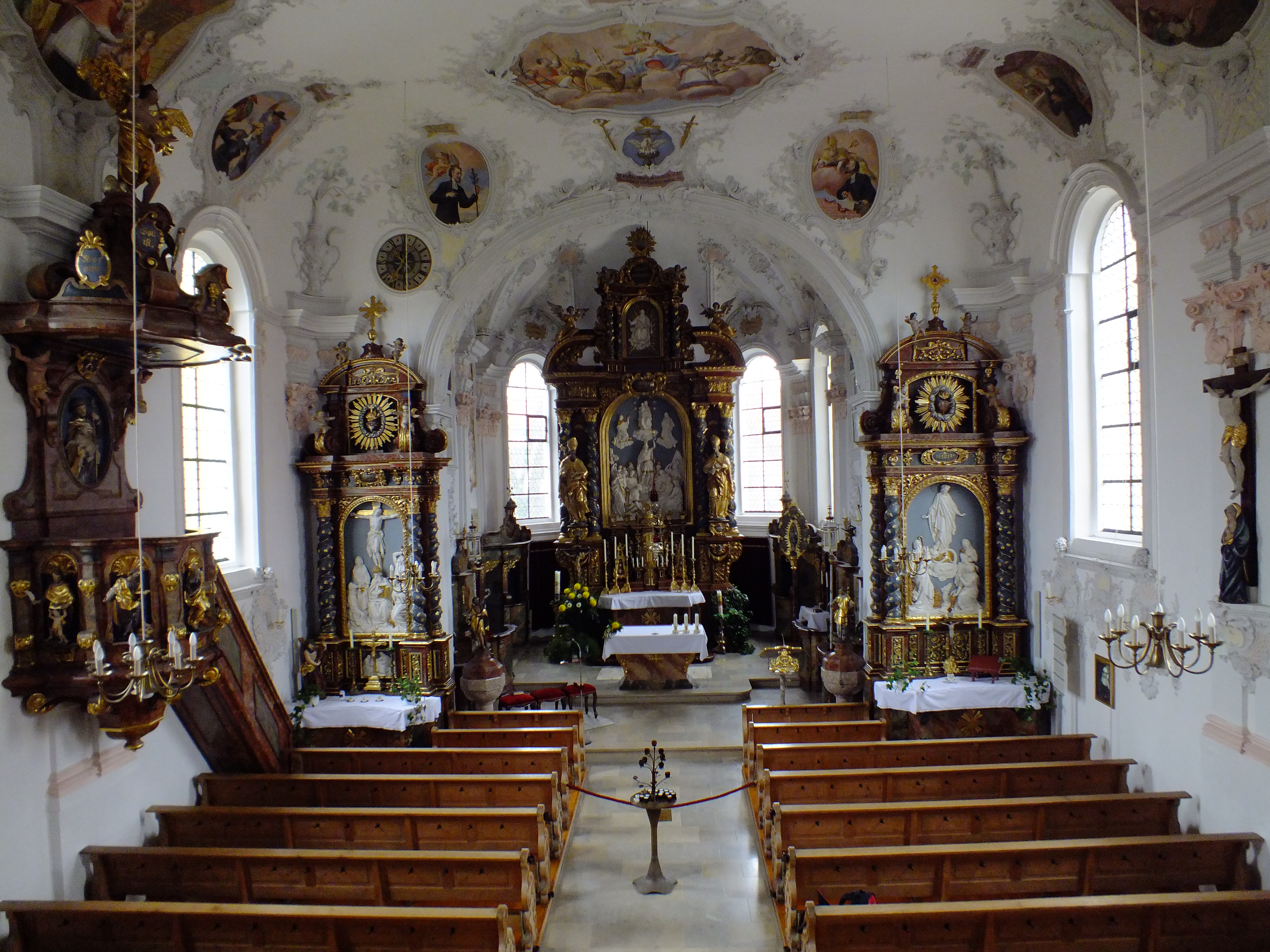 St. Vitus im oberschwäbischen Mauerstetten in Bayerisch/Schwaben